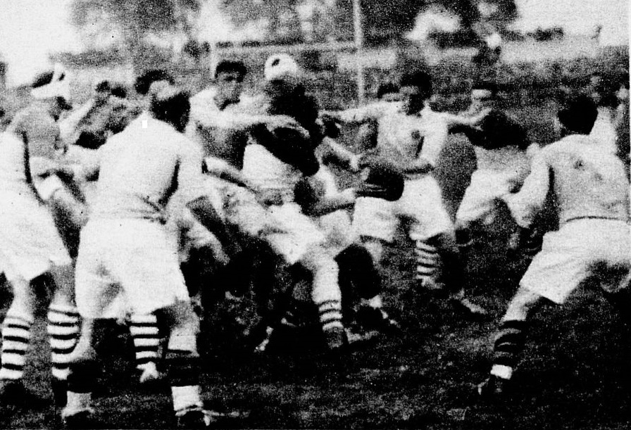 Championnat de France de rugby 1935, Biarritz - USAP, Perpignan éloigne la balle du paquet, l'un des avants ouvre sur Roger Vails le demi de mêlée.